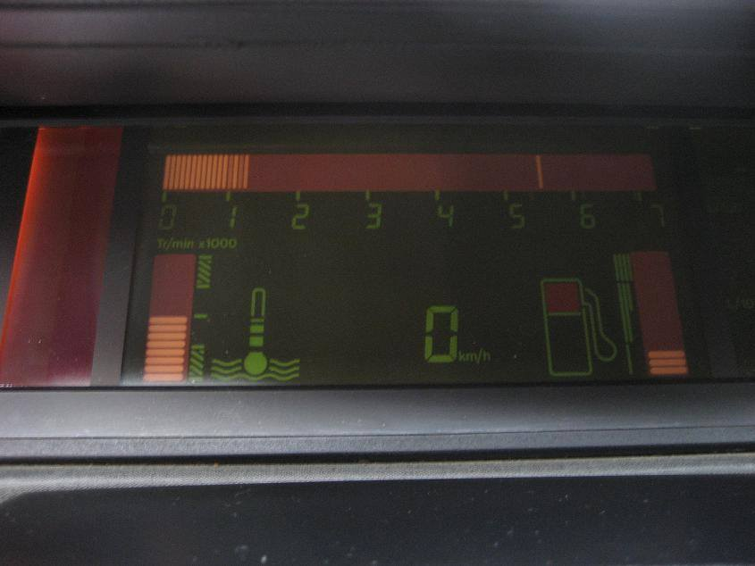 Tableau de bord Renault 11 TXE Electronic de 1984 (millésime 1985). L'instrumentation numérique a le vent en poupe dans l'automobile en ce milieu de décennie 1980. Chez les français, Citroën propose à la même époque sa BX Digit, Renault lance ensuite la 21 TXE. A l'étranger, il y aura notamment la Tipo DGT chez FIAT.